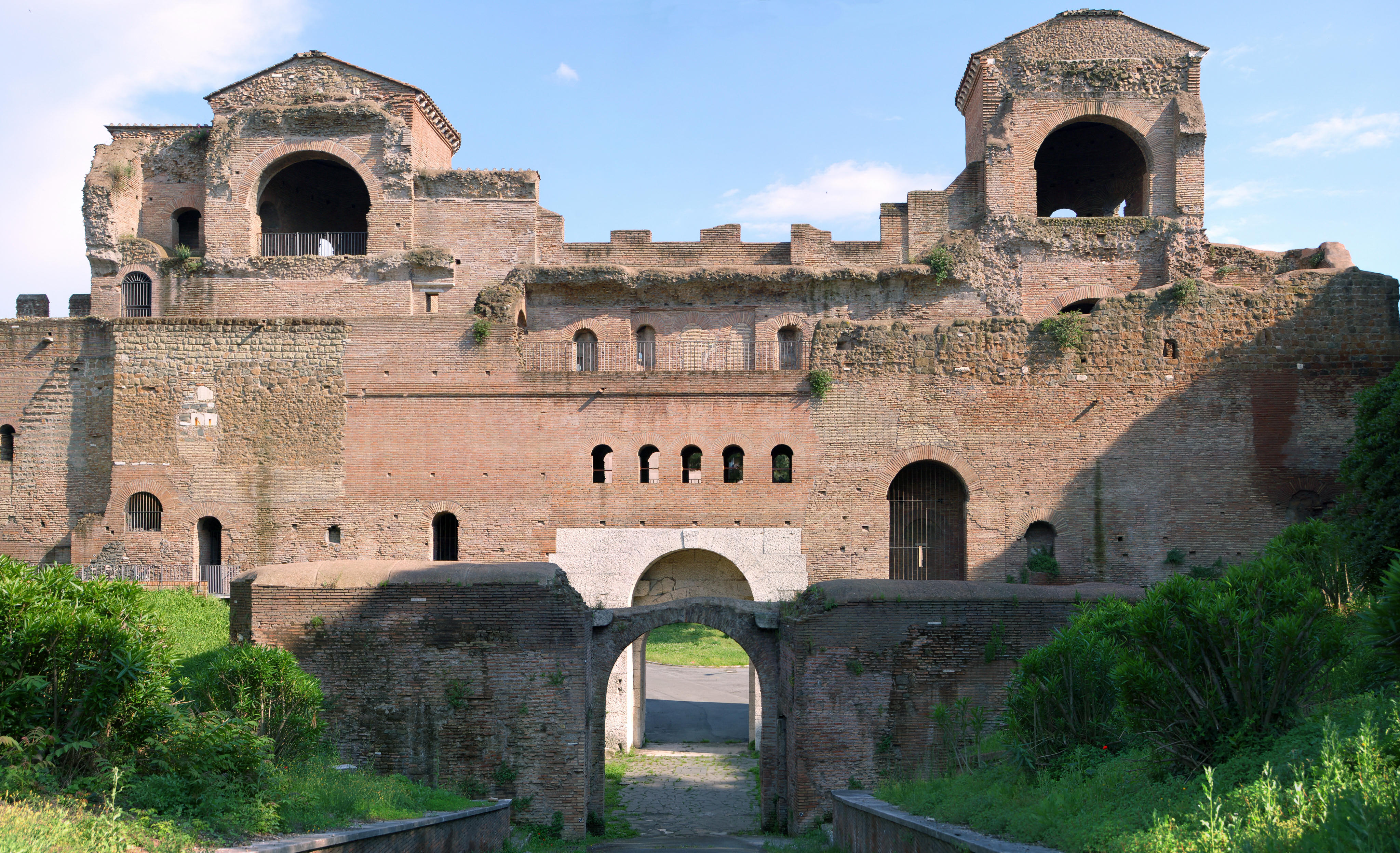 Retro Porta Asinaria, lato interno alle mura Aureliane.